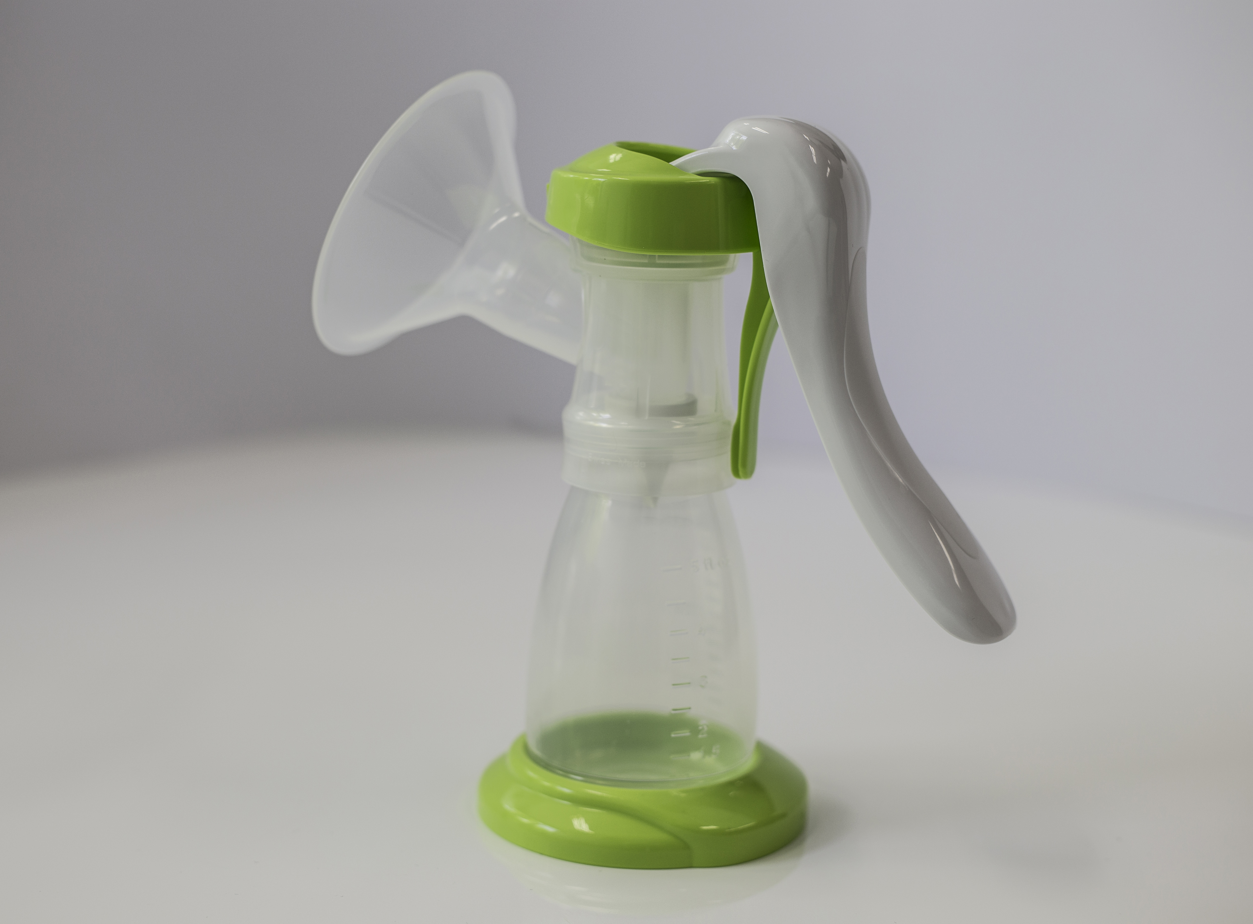 Eine Handmilchpumpe